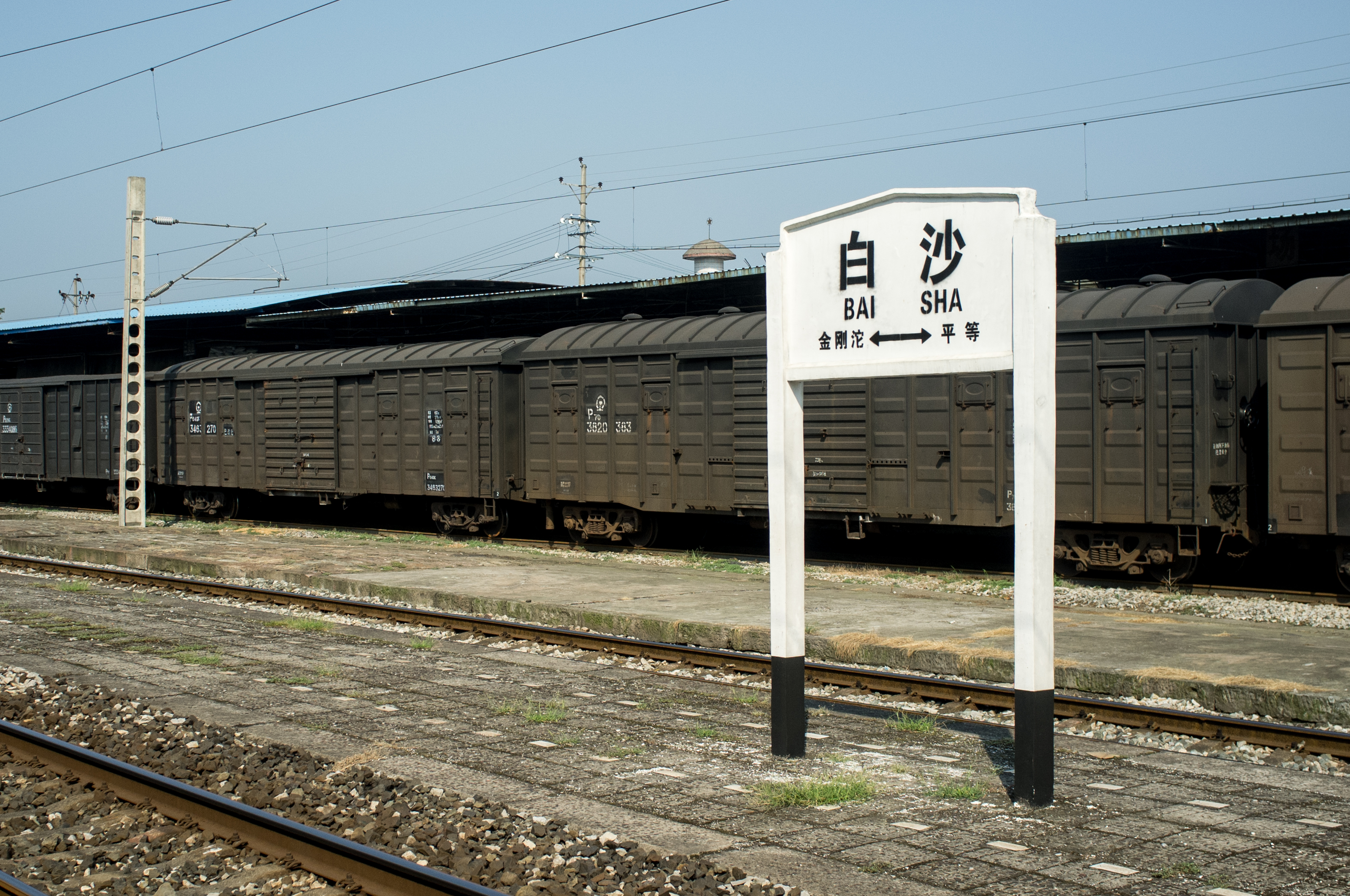 中文（中国大陆）: 成渝铁路白沙站